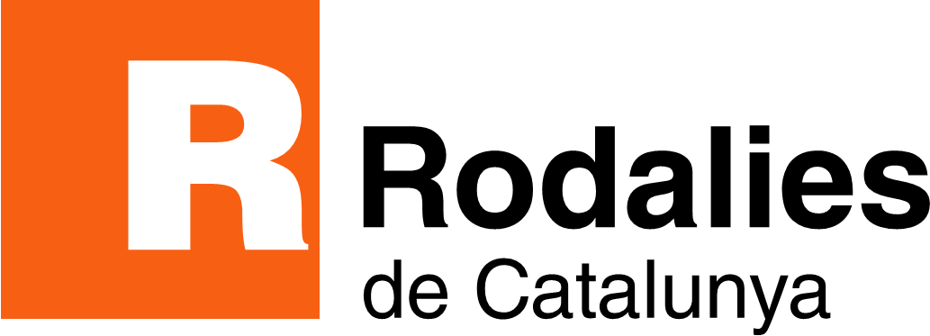 Logotipo que será utilizado en los servicios de Cercanías de Cataluña.